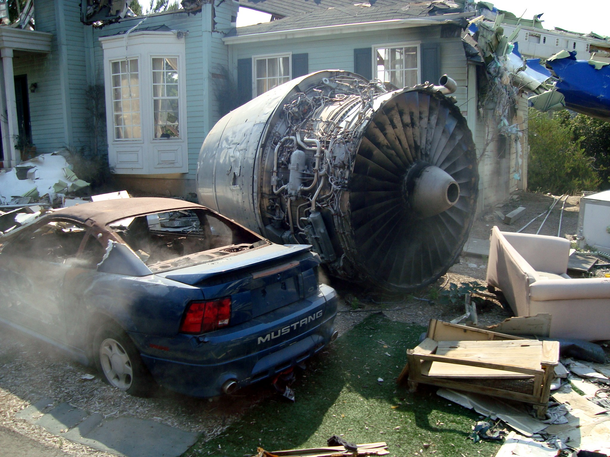 Décors du film La Guerre des Mondes de Steven Spielberg, Studios Universal, Comté de Los Angeles, Californie.